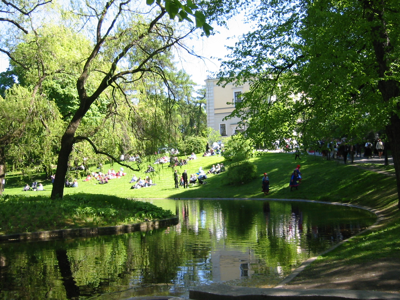 Dronningparken 17. mai 2002